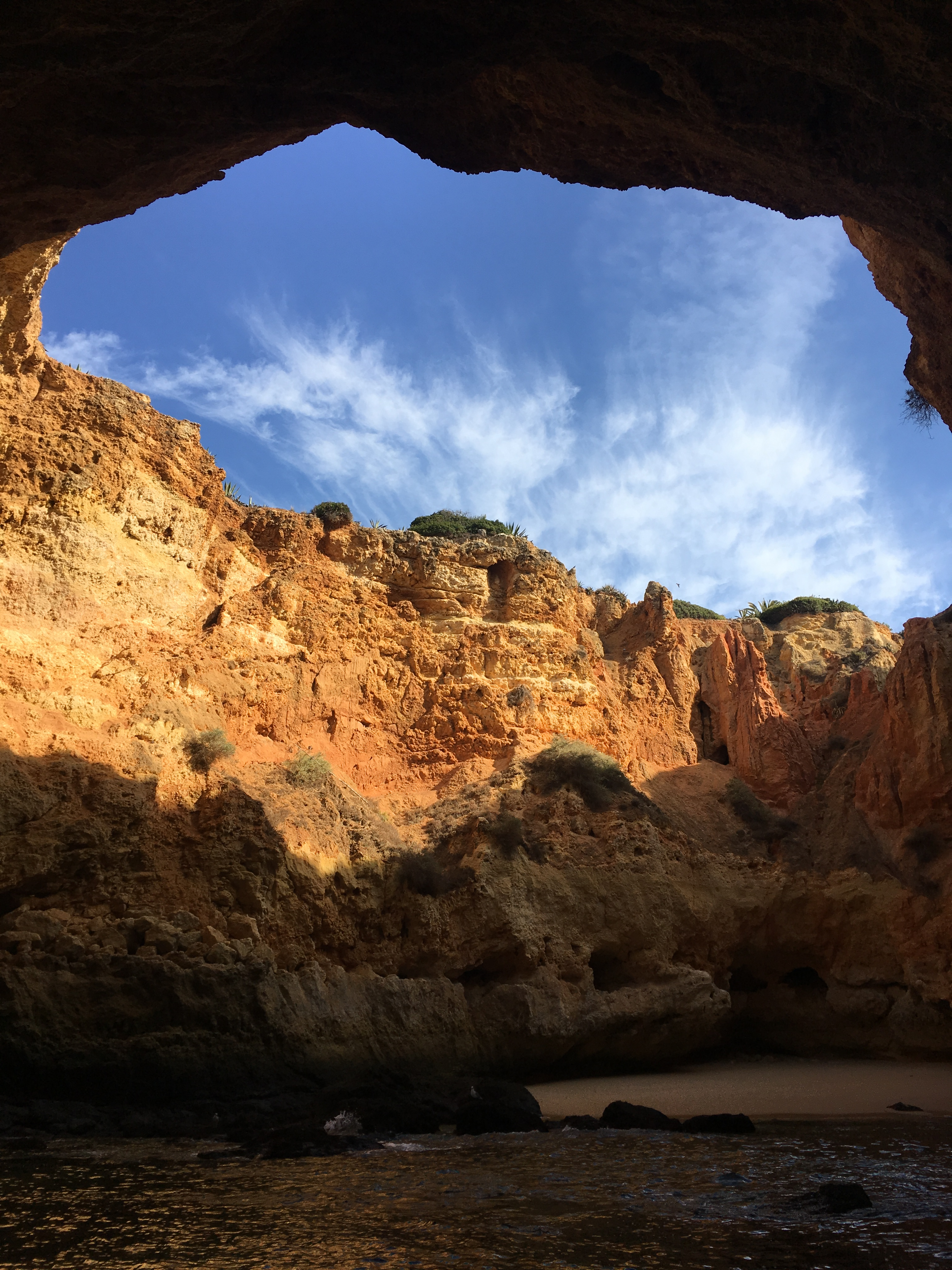 Benagil'de bulunan Benagil Mağarası